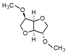 Dimetüül isosorbiidi struktuur